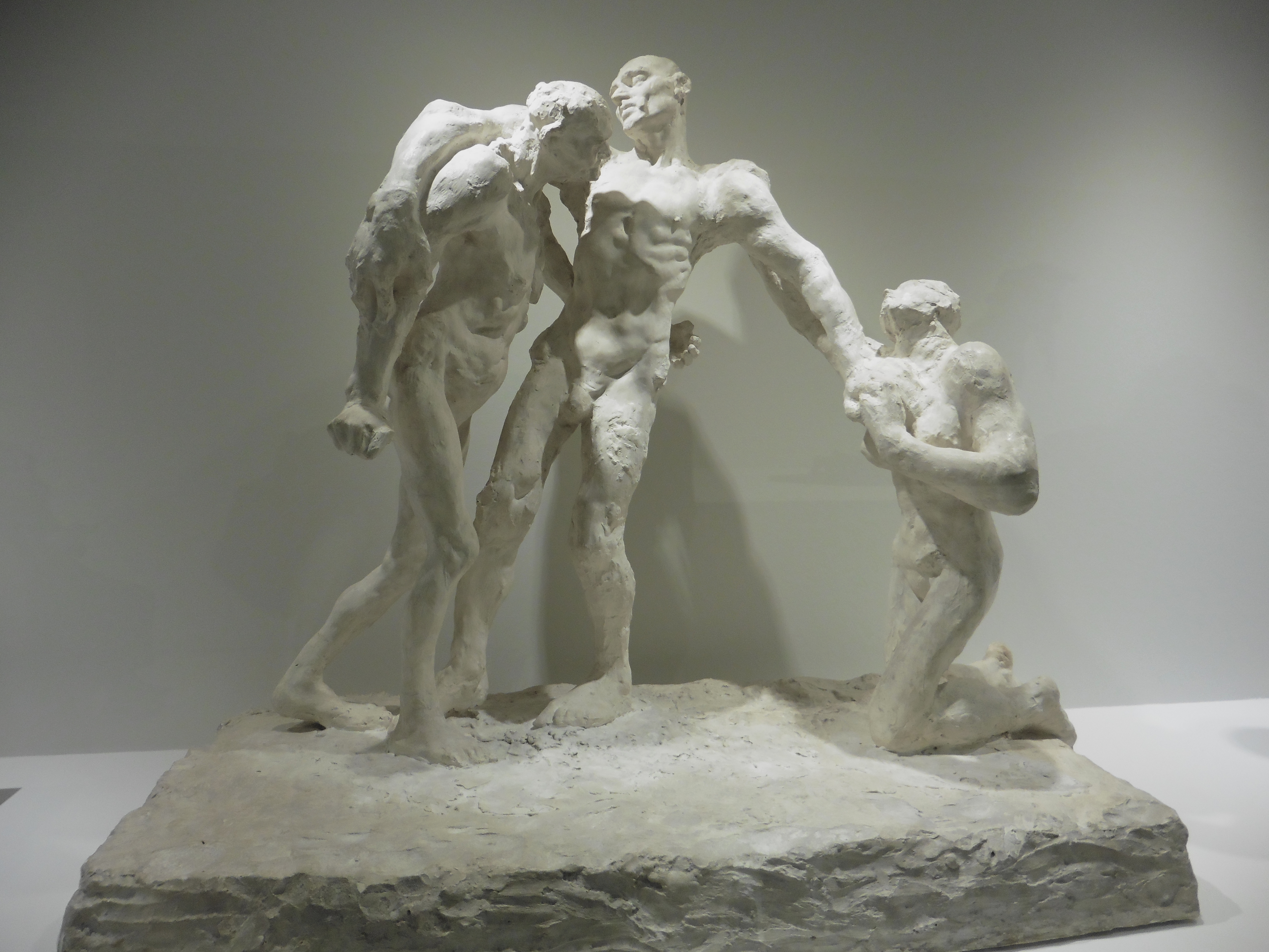 Sculptures de Camille Claudel, "Au miroir d'un art nouveau" au Musée d'Art et d'Industrie de Roubaix dit "la Piscine", Roubaix, France. Camille Claudel (1864–1943) DescriptionFrench sculptor and graphic designerDate of birth/death 8 December 1864 19 October 1943Location of birth/death Fère-en-Tardenois AvignonWork location Paris (1883)Authority control : Q120582 VIAF: 66585142 ISNI: 0000 0001 2137 4309 ULAN: 500102192 LCCN: n82158800 WGA: CLAUDEL, Camille WorldCat creator QS:P170,Q120582